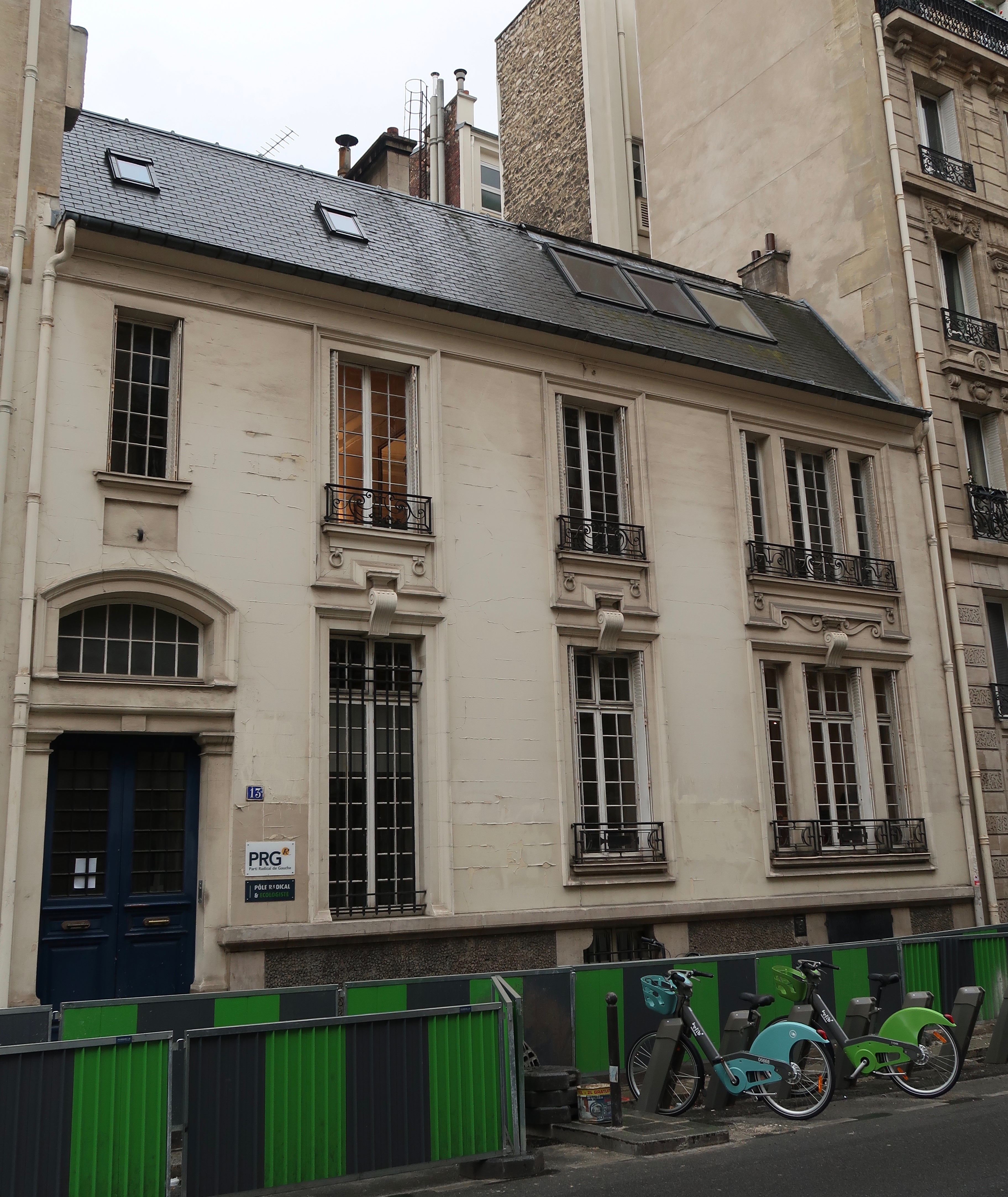 Siège du PRG, n°13 rue Duroc (Paris, 7e).